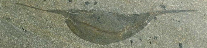 Fossil of Isoxys longissimus